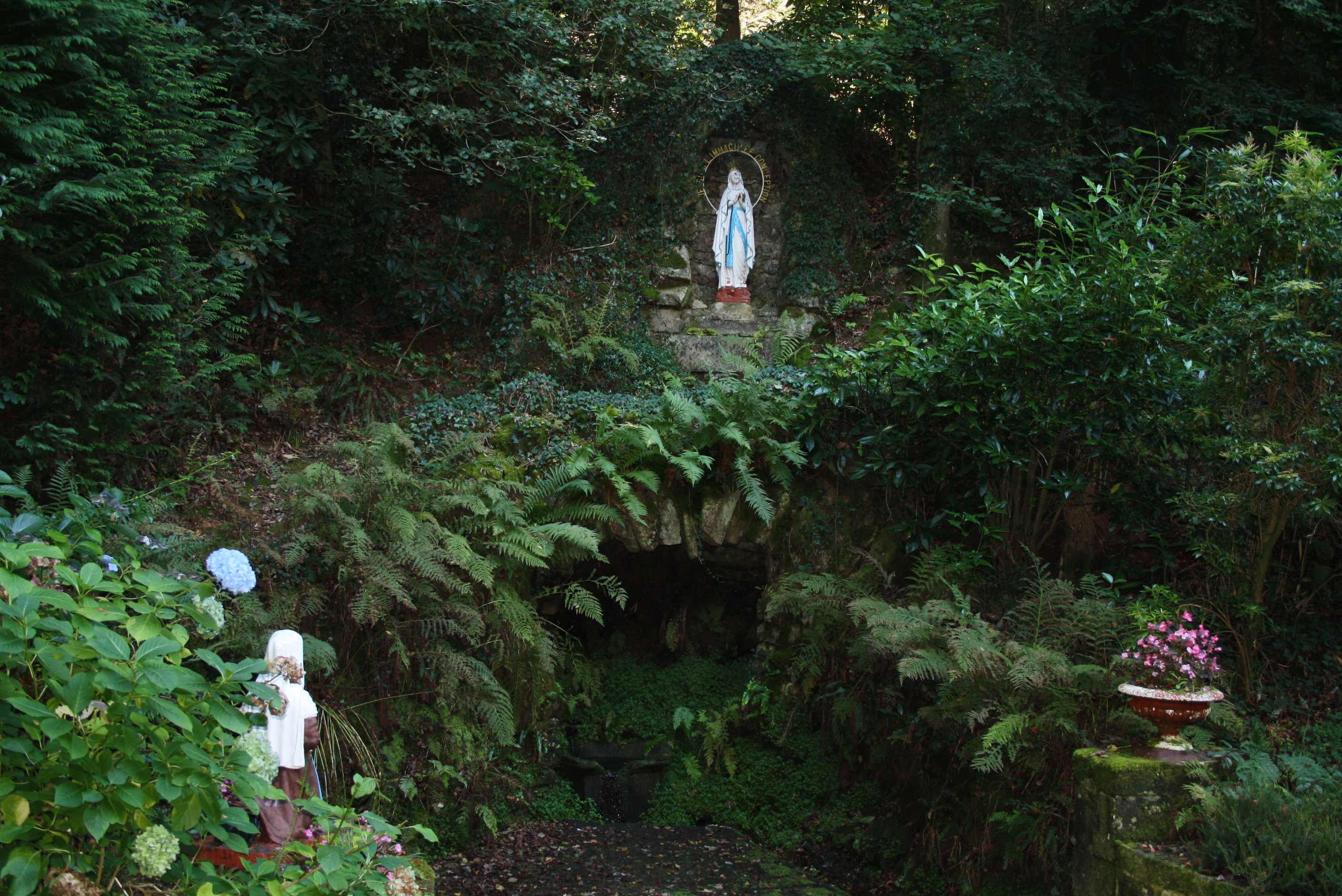 Grotte aménagée par les habitants dans les années 1890 - 1891